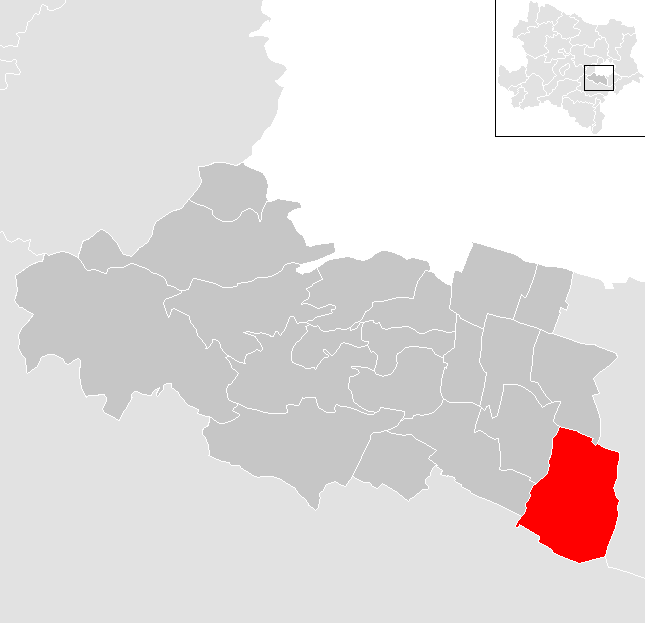 Bezirk Mödling